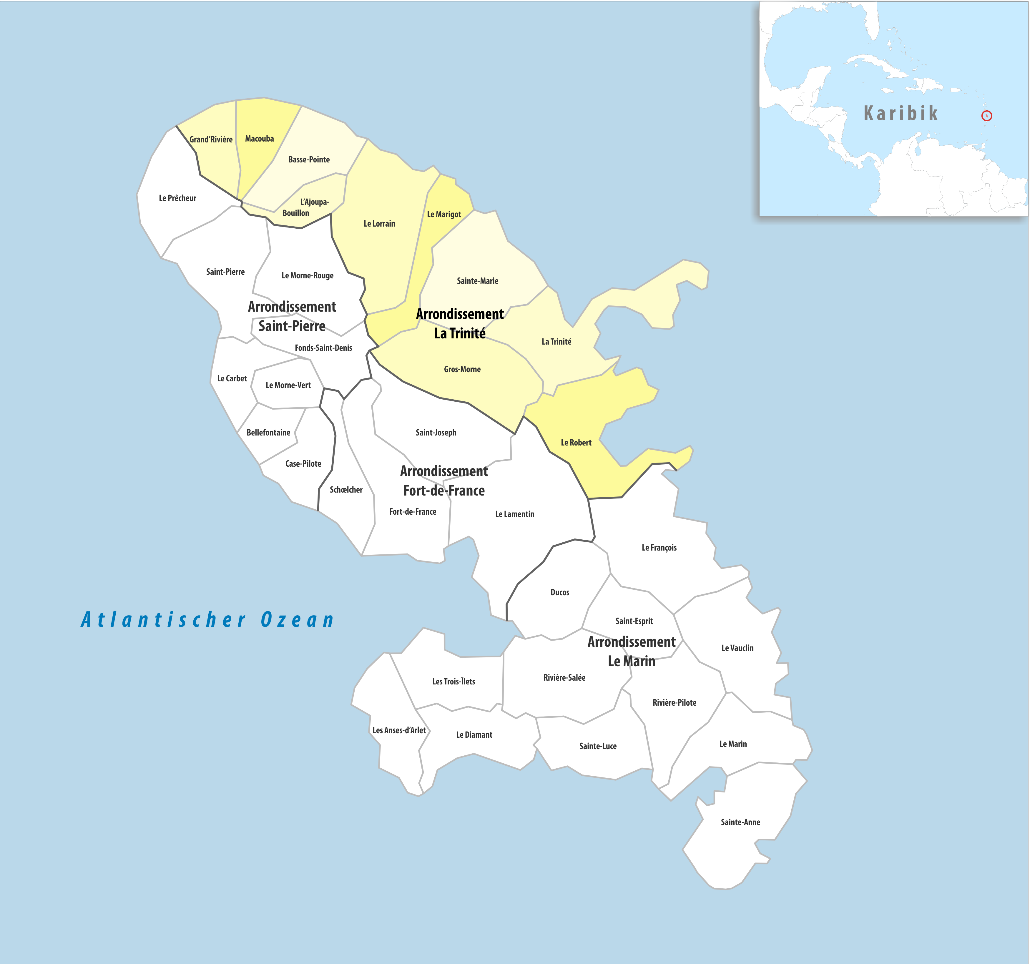 Lage des Arrondissements La_Trinité